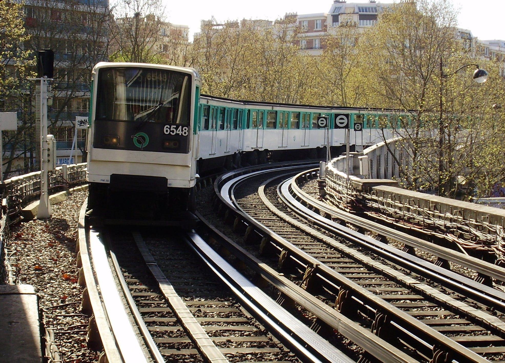 Station Corvisart du métro de Paris : rame MP 73 entrant en station et se dirigeant vers Nation